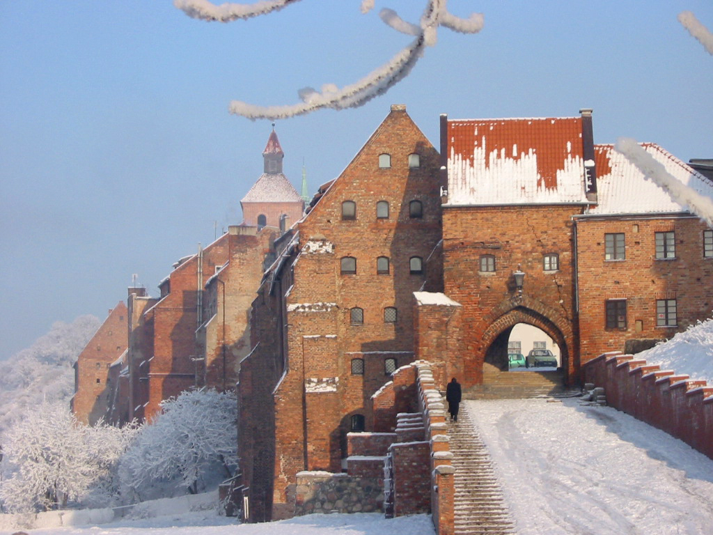 Brama Wodna w Grudziądzu